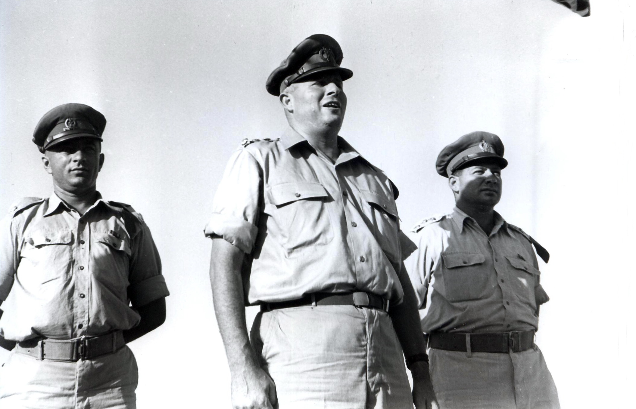 אסף שמחוני, במרכז התמונה, מפקד פיקוד הצפון בטקס העליה לקרקע של היאחזות נח"ל שגב (?) בגליל - אוגוסט 1953